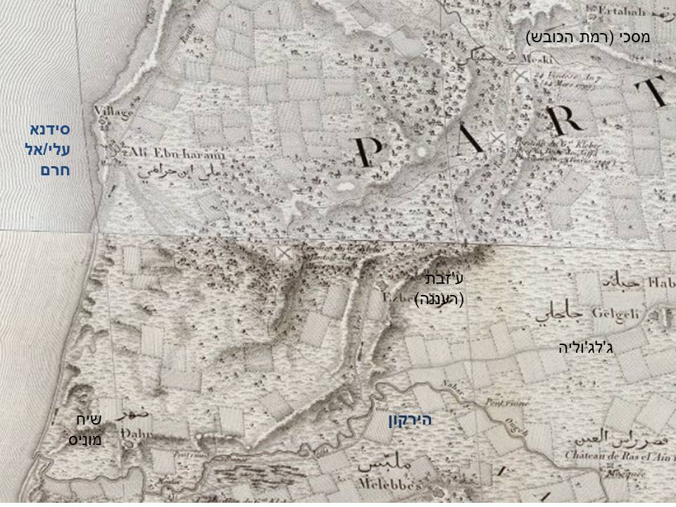 יער השרון במפת ז'אקוטן (1798)